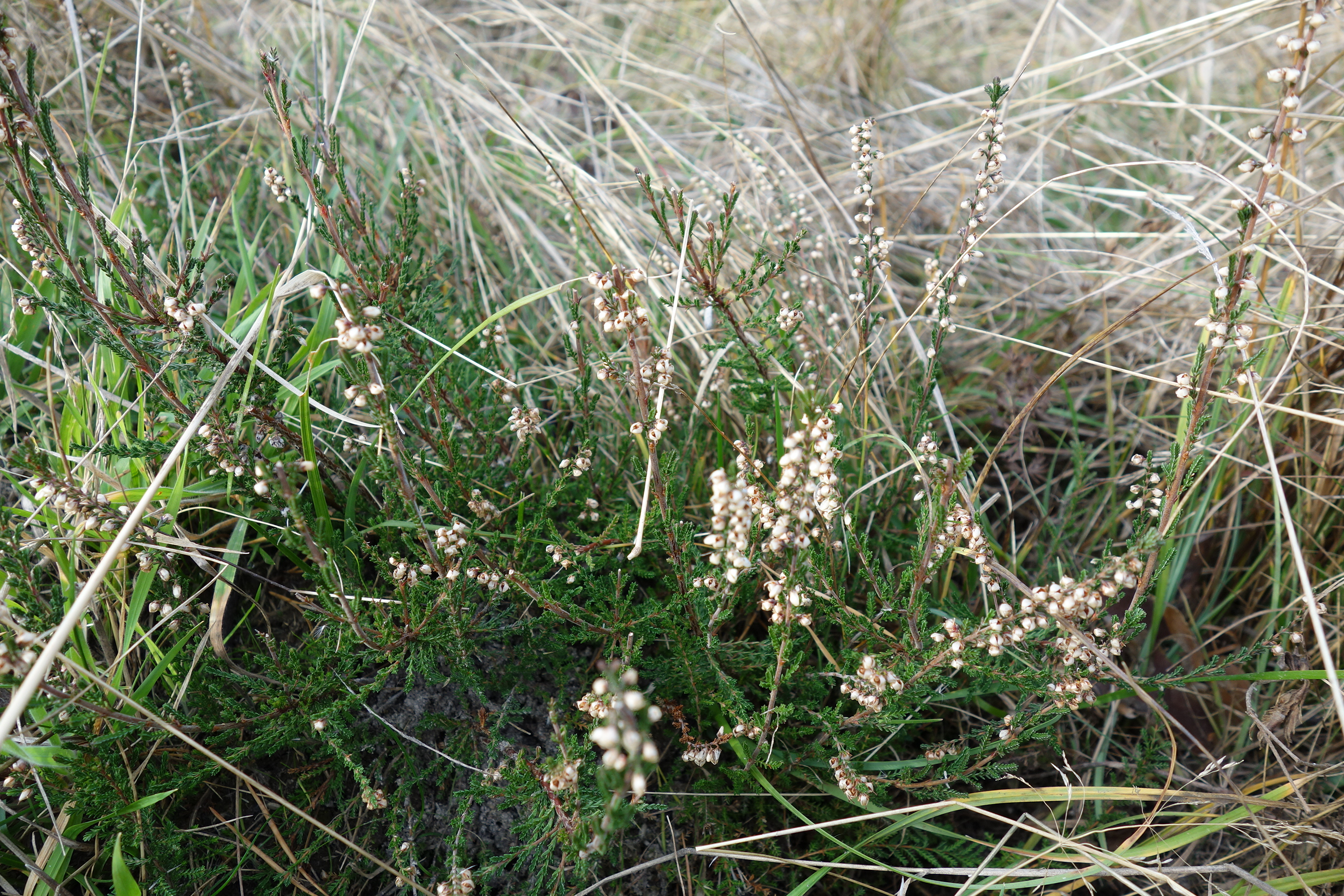 rostlina čeledi vřesovcovité